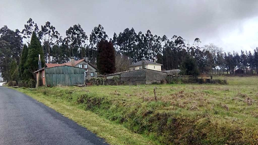 Castro de Ril, Vilasantar.